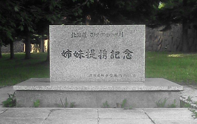 日本の北海道とカナダのアルバータ州の姉妹提携を記念した碑。1980年10月17日に建立された。北海道開拓記念館の西側の草地脇に建てられている。